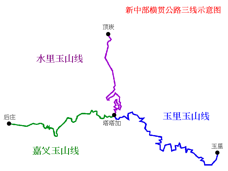 新中部横贯公路三线示意图。